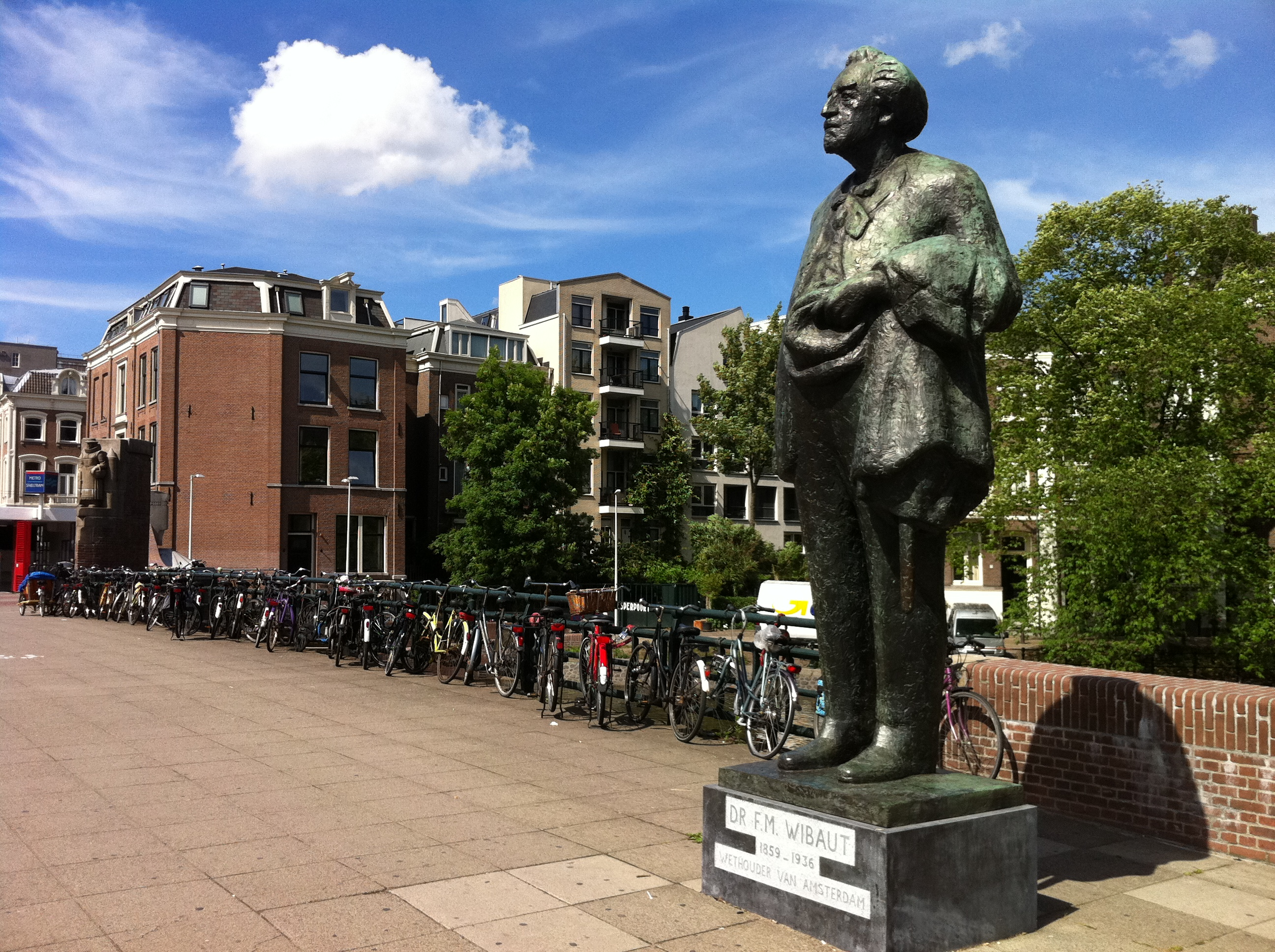 Standbeeld Floor Wibaut op de brug Weesperpoort op het Rhijnspoorplein in Amsterdam